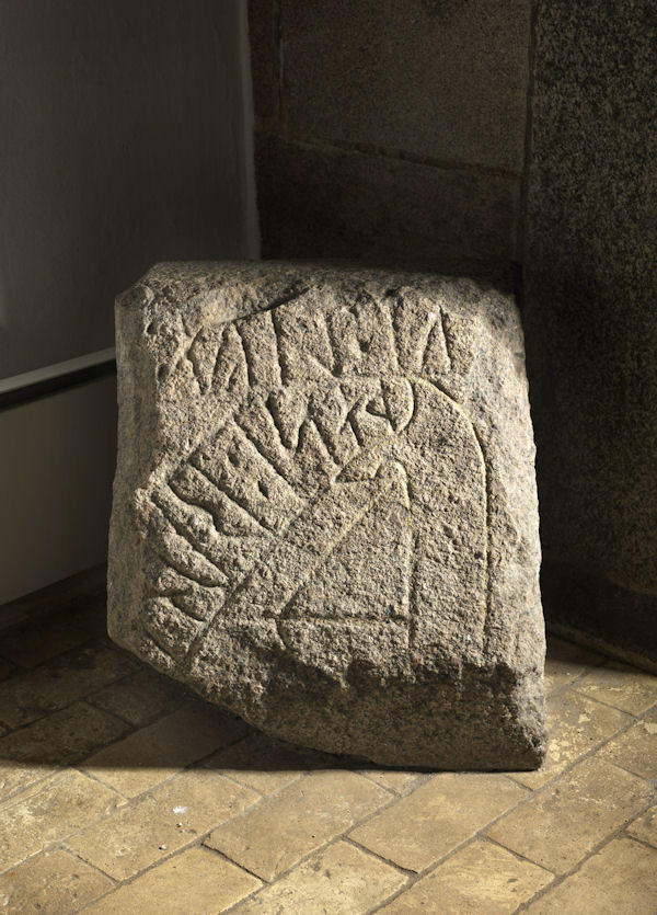 Foto: Nationalmuseet ved Roberto Fortuna